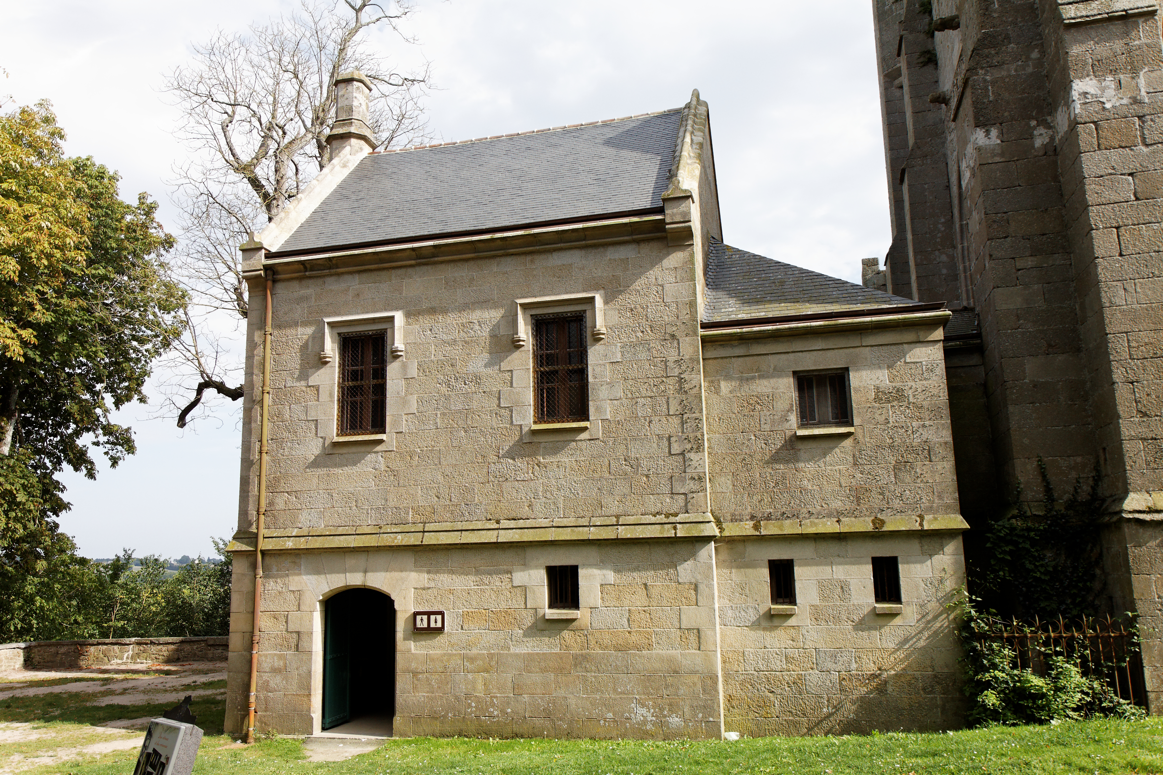 Sacristie de la collégiale Notre-Dame à Lamballe (Côtes d'Armor).